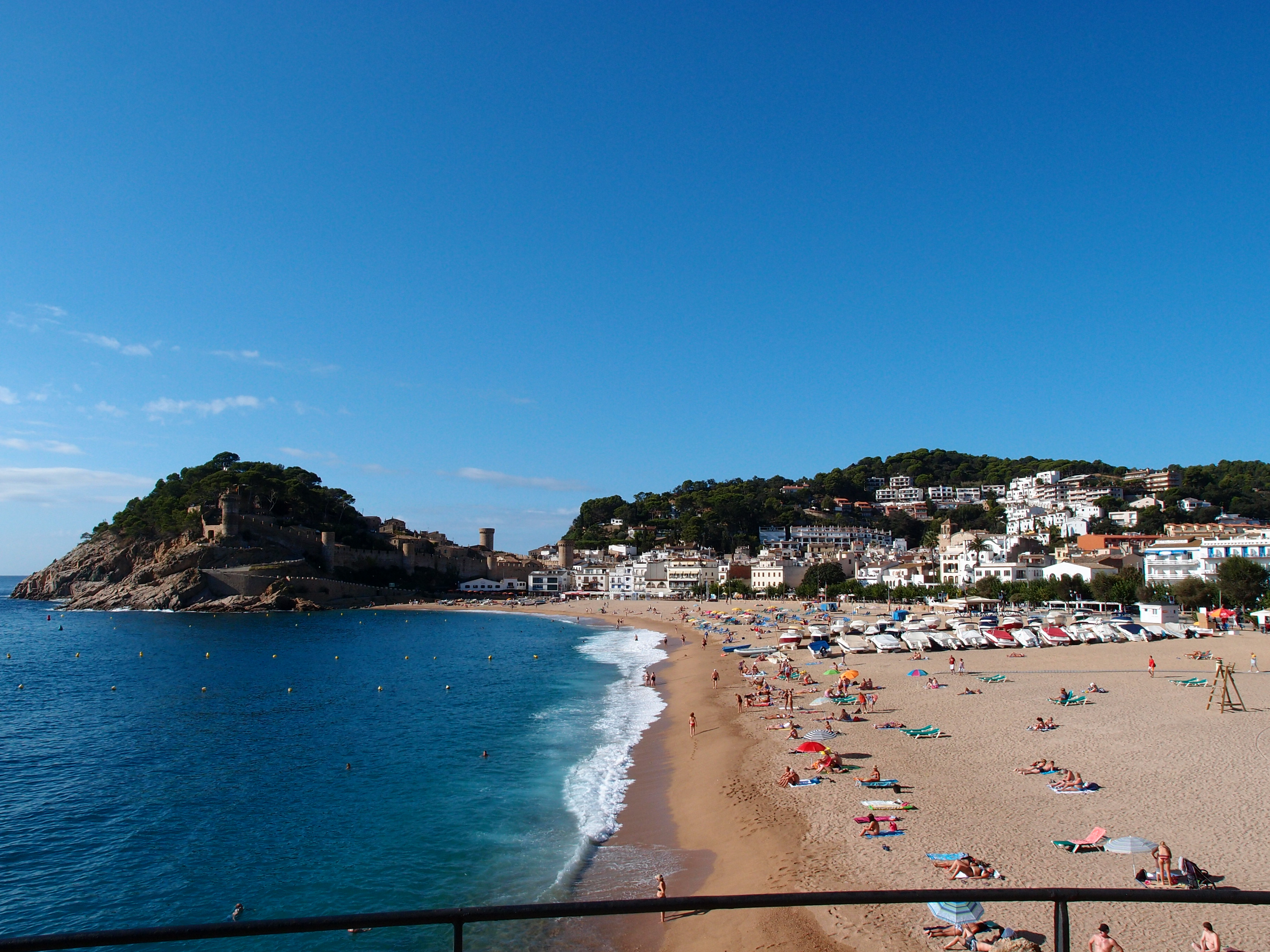 Strand und Burganlage von Tossa de Mar - Katalonien/Spanien Datum: 20.09.2011 Urheber: M. Pfeiffer alias Gordito1869 Quelle: Privates Fotoarchiv des Urhebers